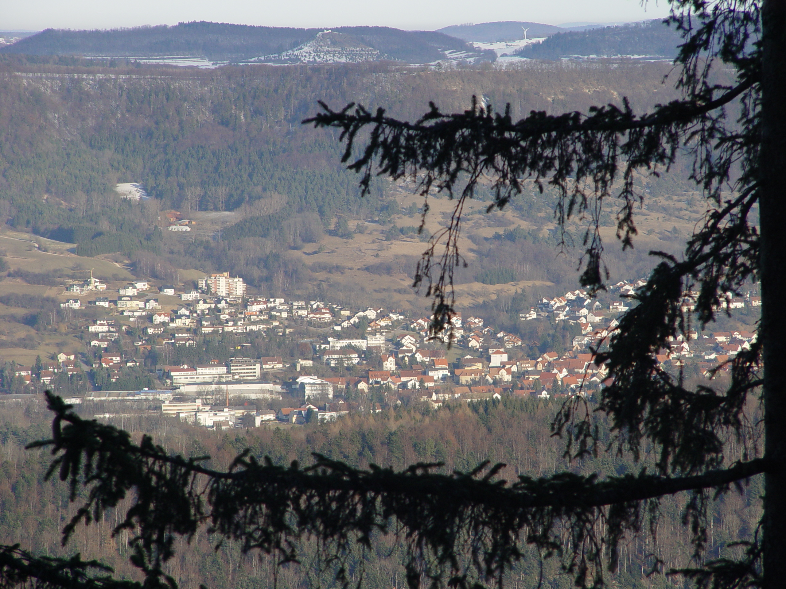 Jungingen vom Raichberg aus gesehen, im Hintergrund der Kornbühl und dahinter der Windpark Himmelberg